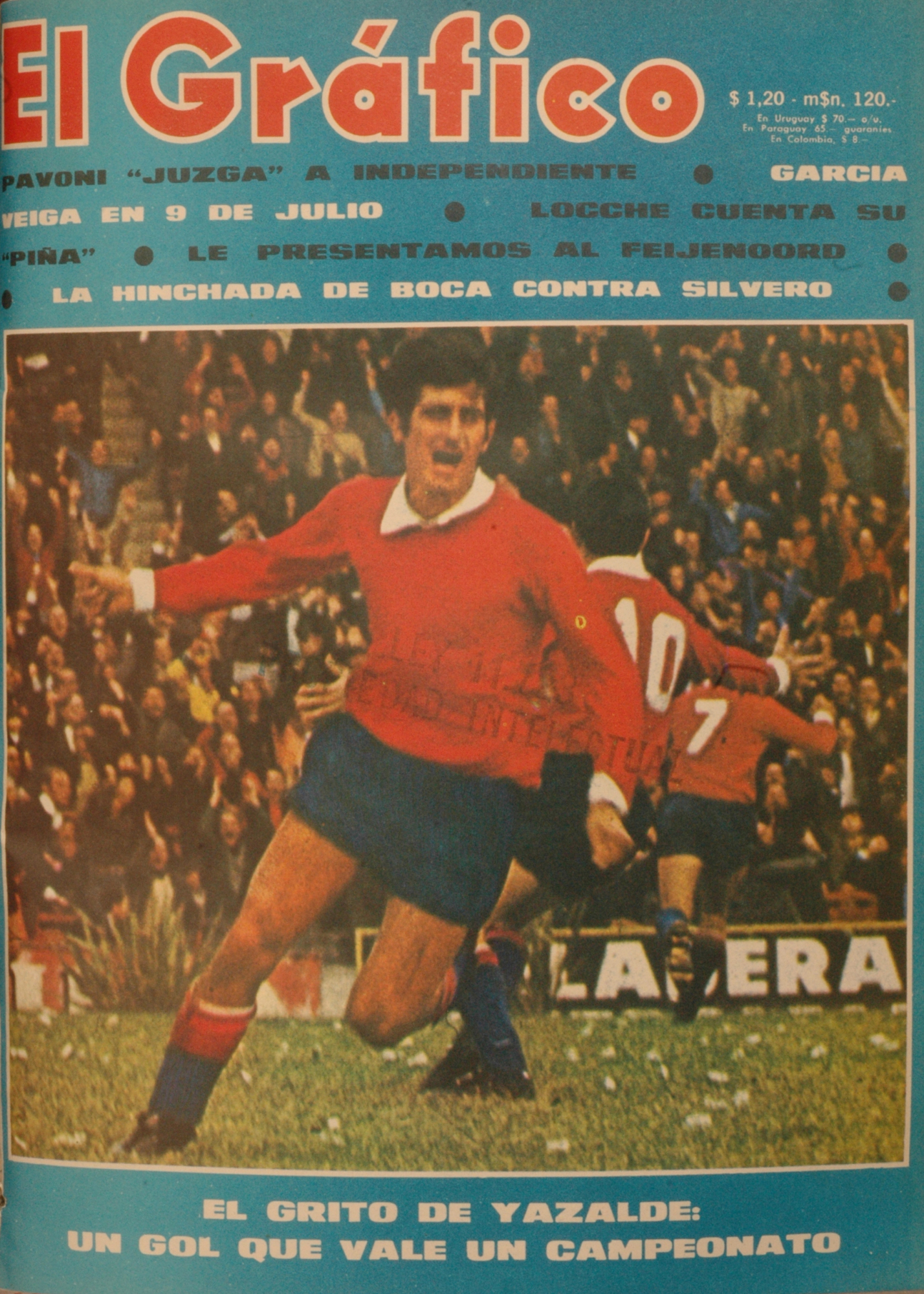 El Grafico del 28 de Julio de 1970. Edicion 2651